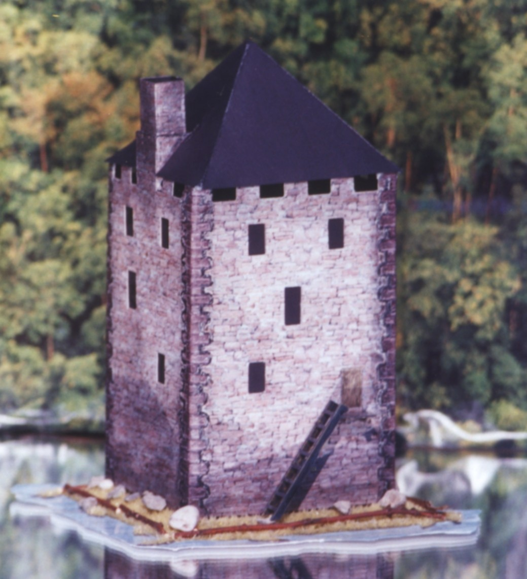 Wasserburg Heyden nach der Fertigstellung im Jahre 1303 (Modell der Hauptburg mit Wohnturm, Maßstab 1:100)